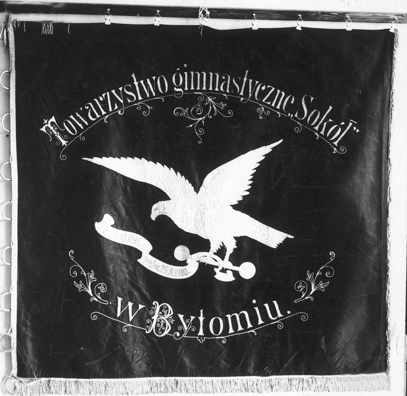 Sztandar Towarzystwa Gimnastycznego "Sokół" w Bytomiu. Sztandar najstarszego gniazda - widok strony prawej sztandaru.